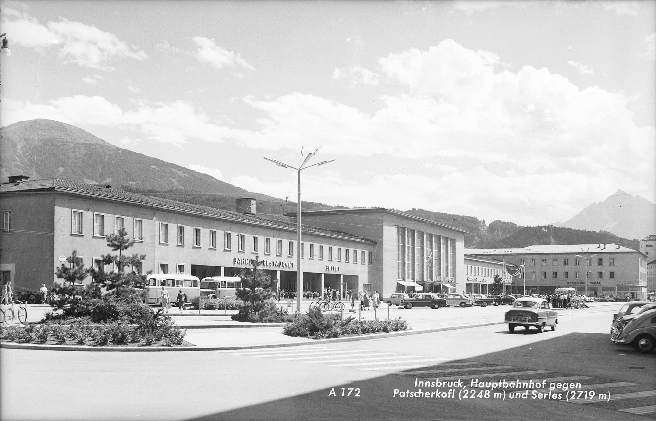 Innsbruck / Hauptbahnhof gegen Patscherkofl 2248 m und Serles 2719 m